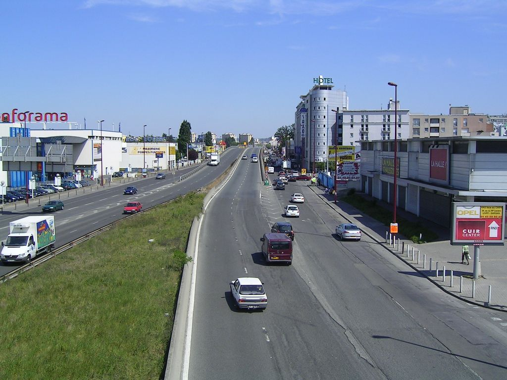 Zone commerciale et Route Nationale 3, direction Meaux Photo personnelle (own work) de Marianna